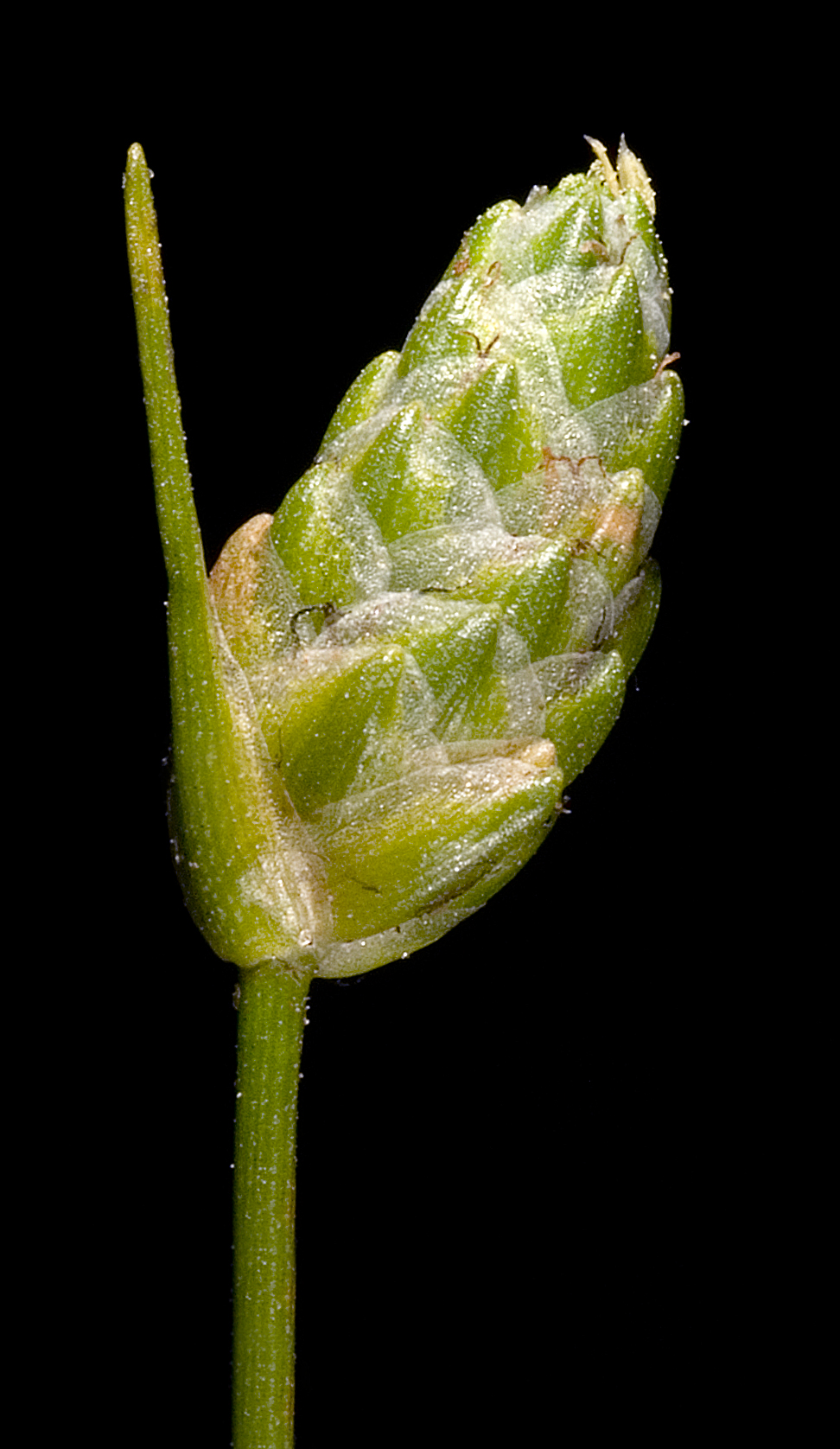 KRT3843